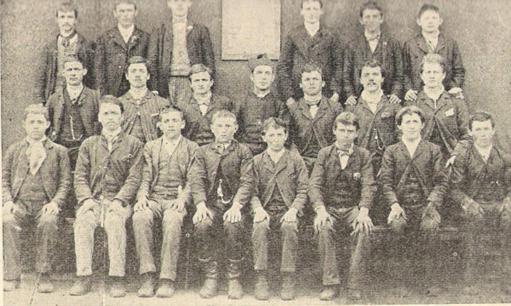 Pietro Nosadini e alunos da Escola Paroquial de Caxias do Sul